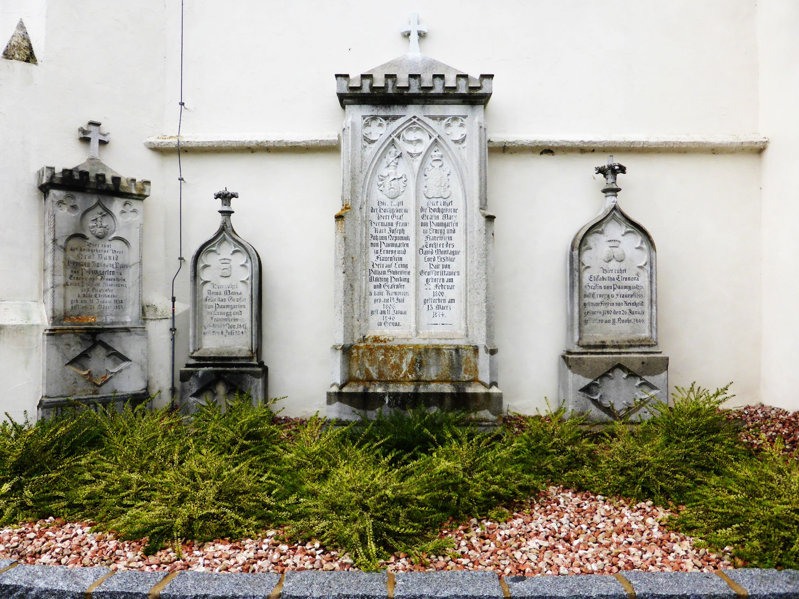 Epitaph der Familie Ering-Stubenberg, Besitzer von Schloss Stubenberg